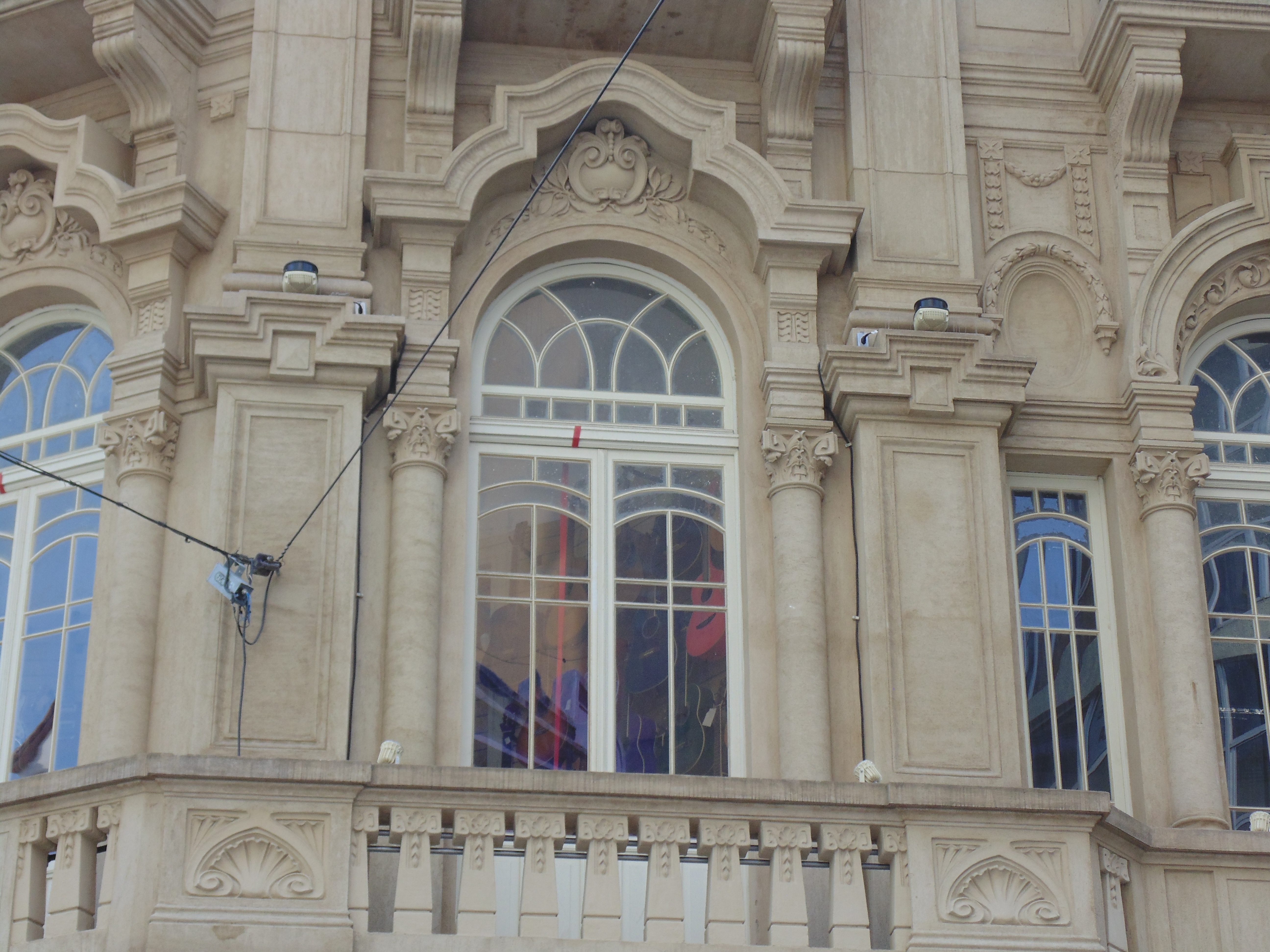 Janela com instrumentos ao fundo no Palacete Tereza Toledo Lara, em São Paulo (SP), Brasil